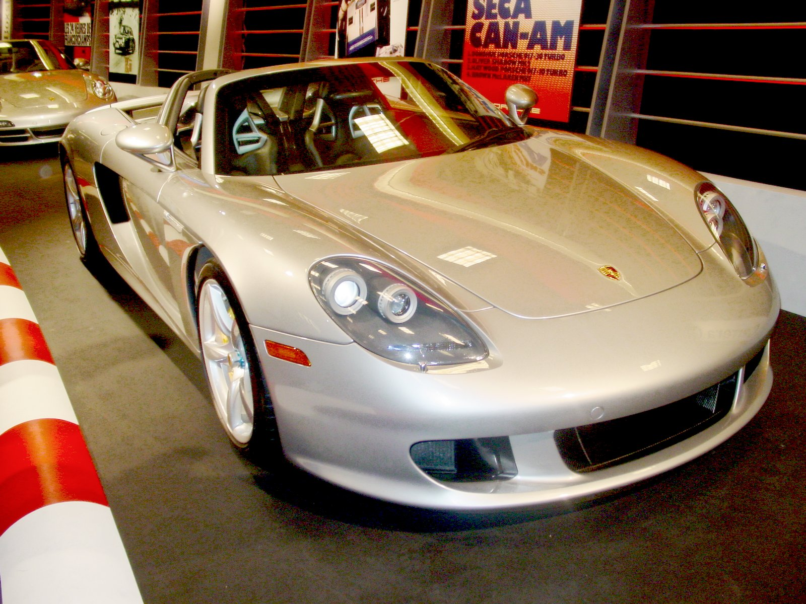 4 gün önce, Los Angeles otomobil fuarında çektiğim; 2006 Porsche Carrera GT.